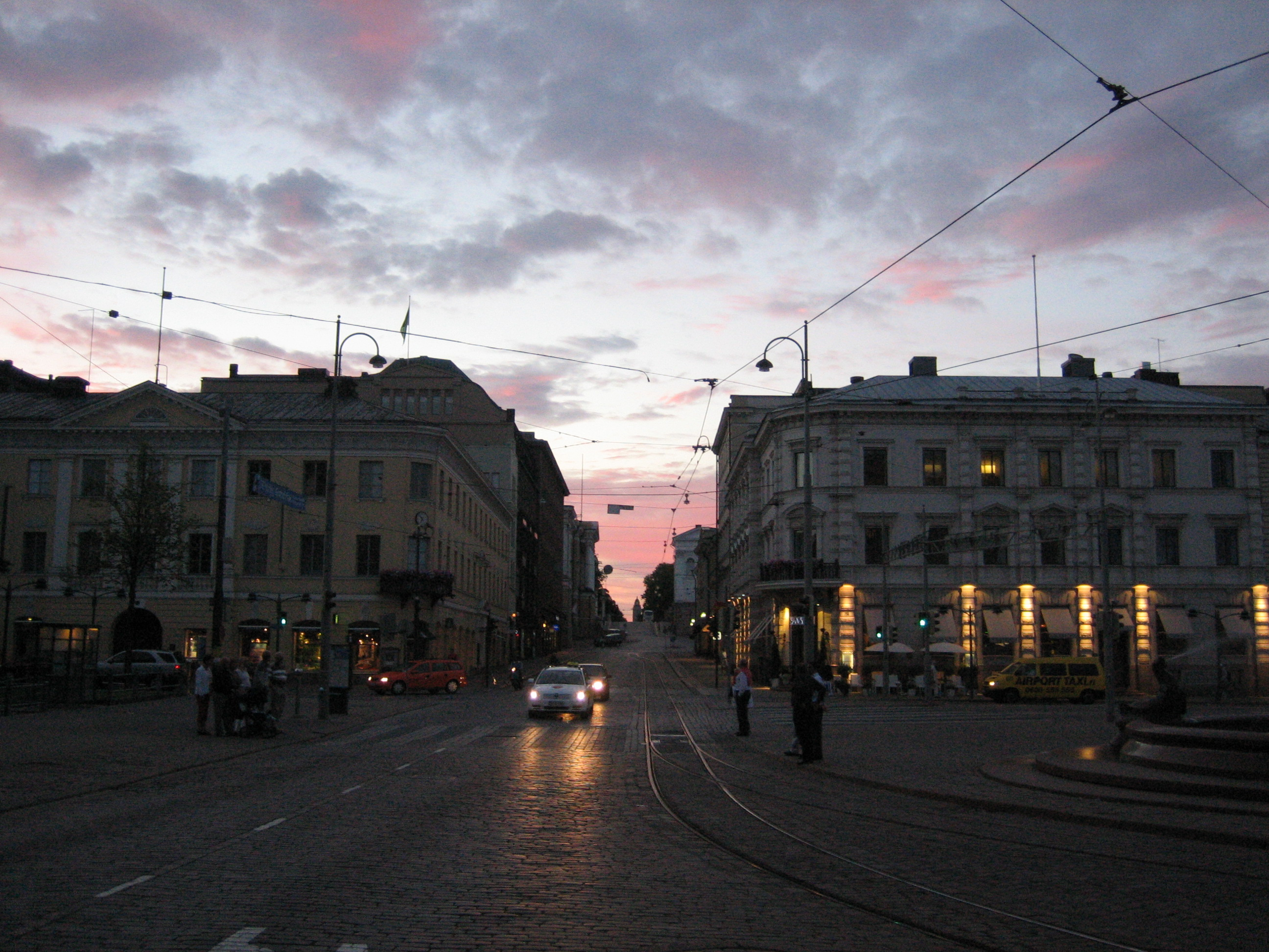 Helsingin Unioninkatu, nähtynä Pohjoisespan kohdalta, öö...luoteeseen päin katsoen. Tai pohjoiseen.